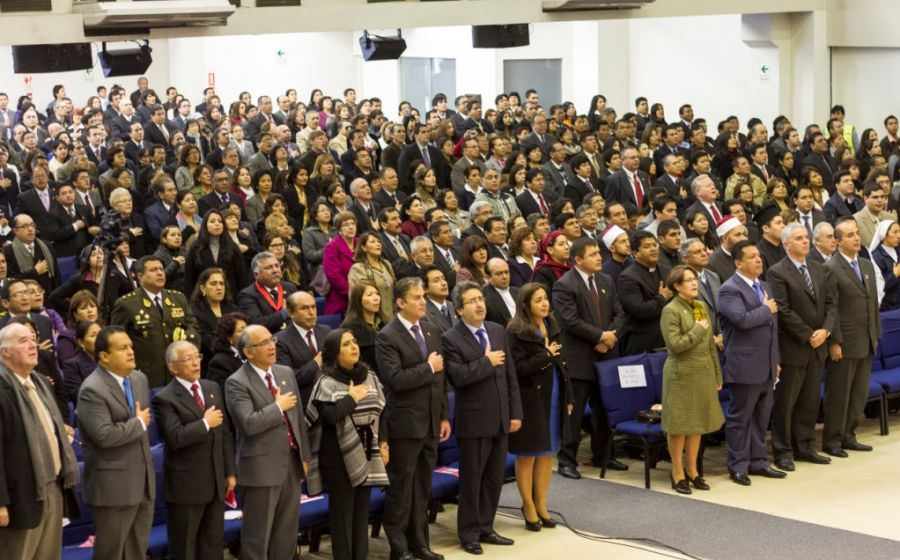 Ceremonia de Acción de Gracias 2013